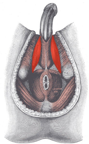 Ischiocavernosus muscle (male)